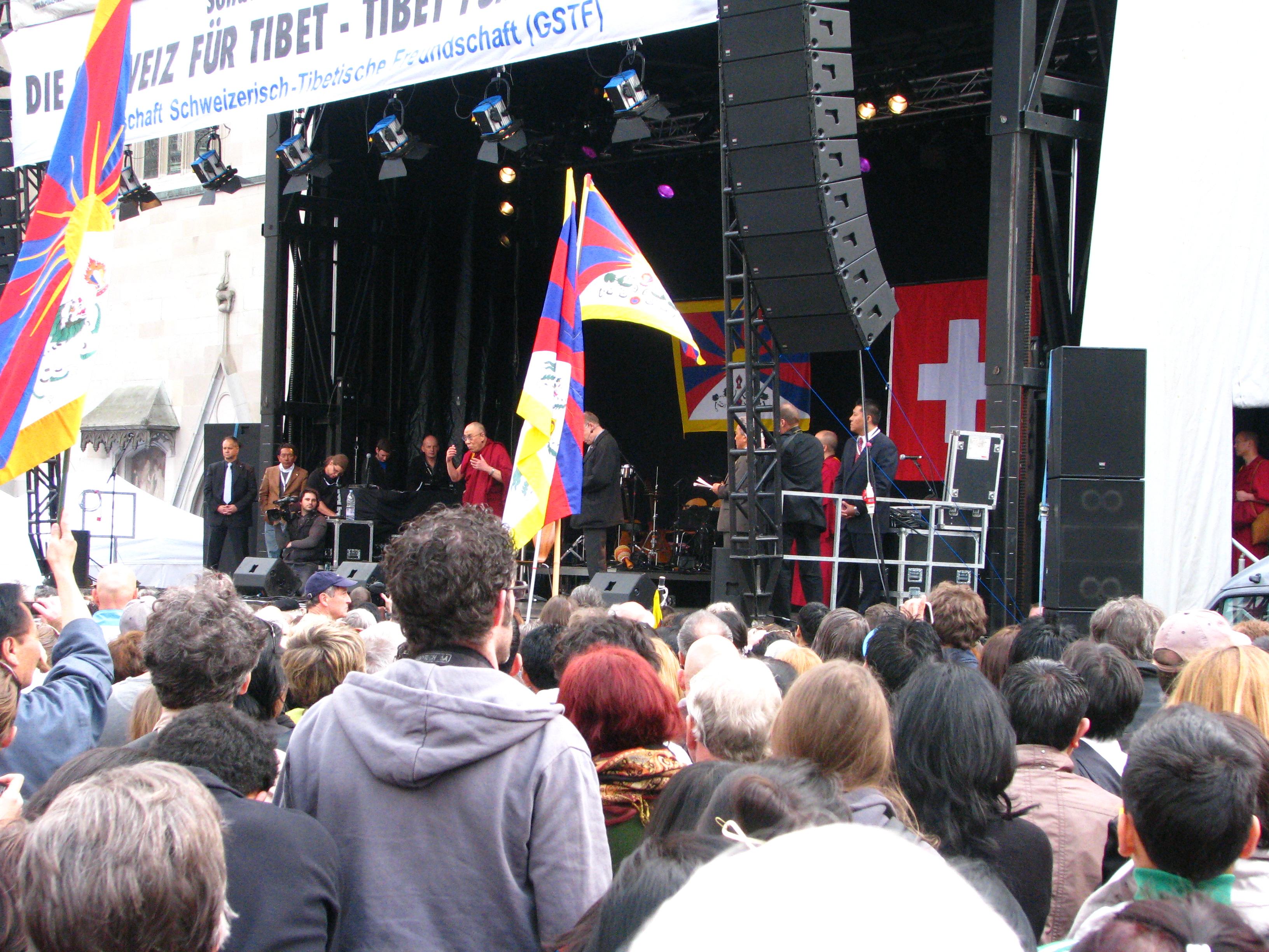 Seine Heiligkeit der 14. Dalai Lama an der Solidaritätskundgebung Die Schweiz für Tibet - Tibet für die Welt vom 10. April 2010, veranstaltet von der Gesellschaft Schweizerisch-Tibetische Freundschaft (GSTF) auf dem Münsterhof in Zürich.